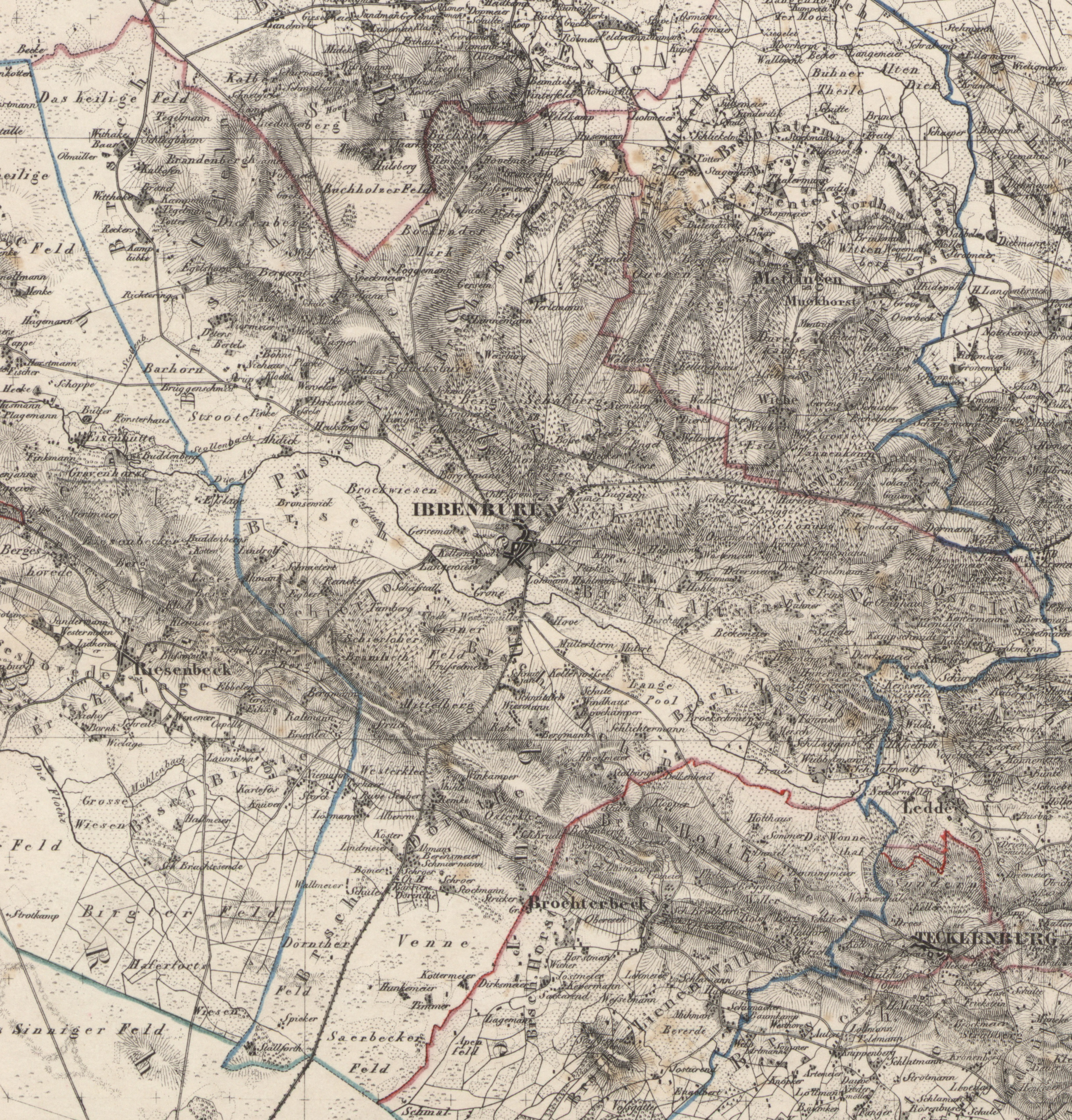 Location of Stadt and Landgemeinde Ibbenbüren